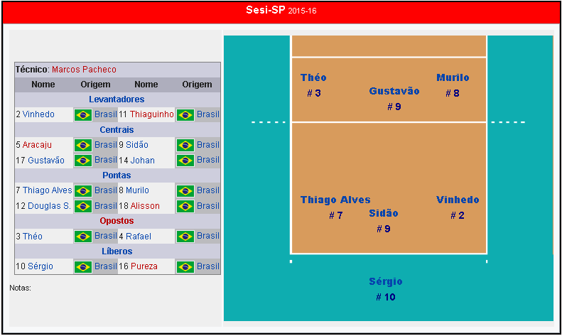 Time masculino do Sesi-SP, na temporada 2015-16.